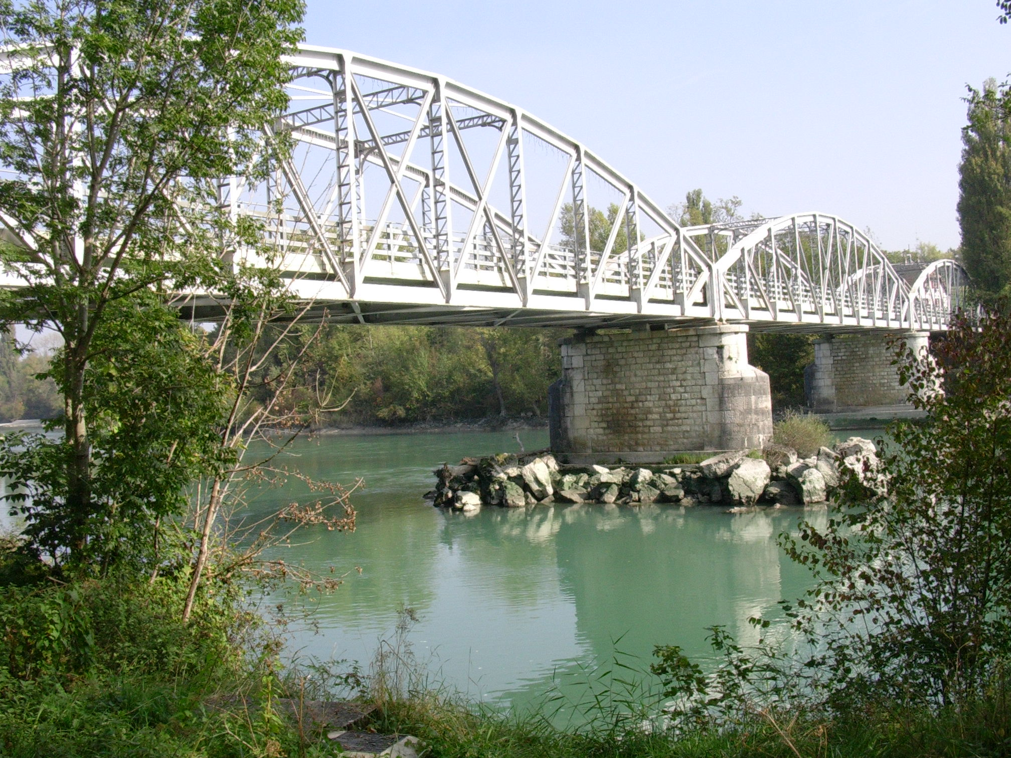 Pont de Chancy sur le Rhône (frontière franco-suisse)